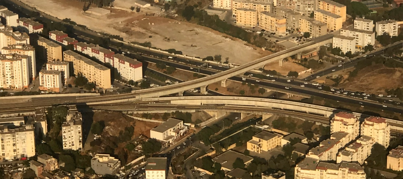 Vue aérienne de la jonction des deux branches de la ligne 1 du métro d'Alger après la station Hai El Badr